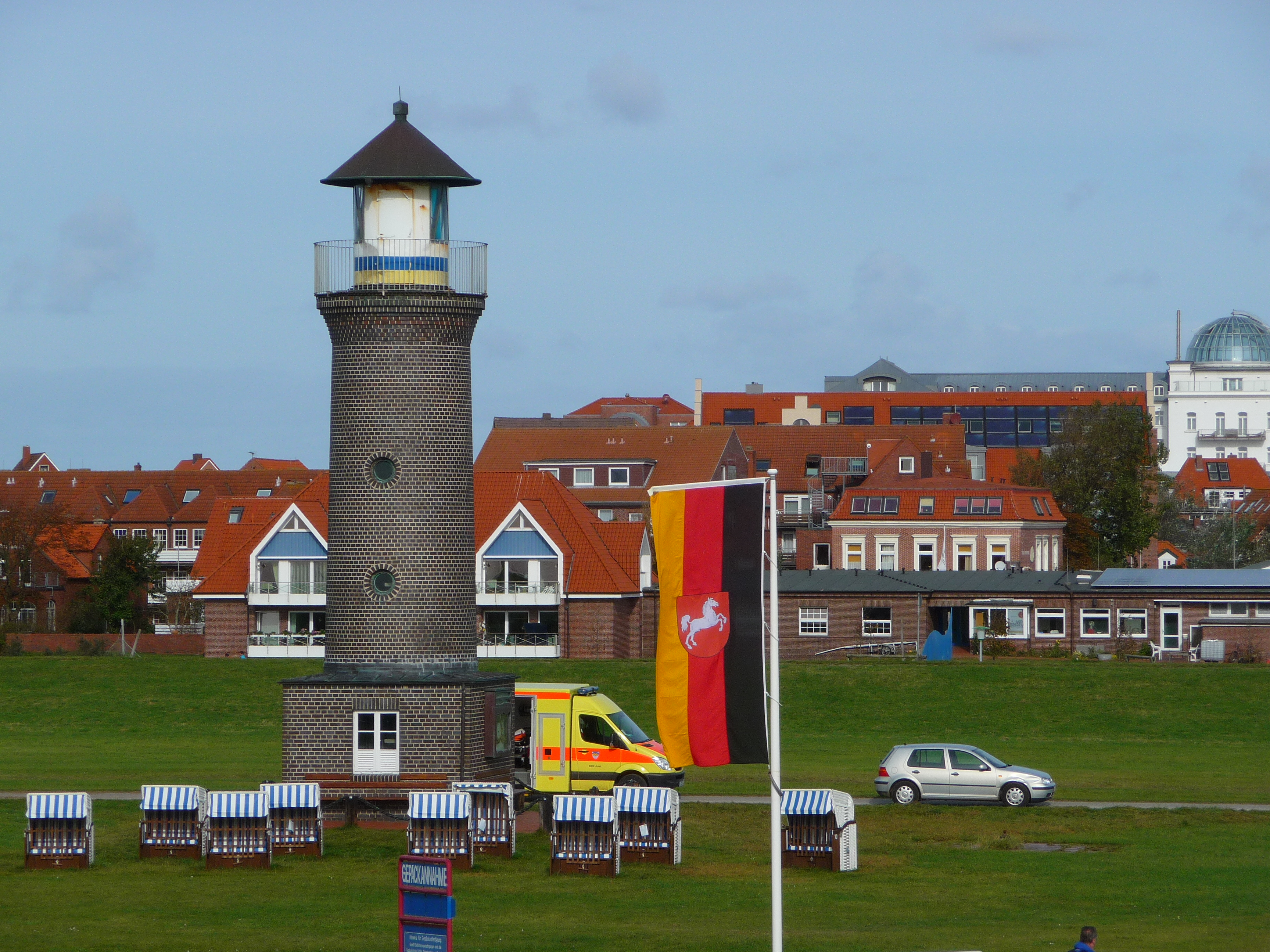 Blick auf den Leuchtturm auf der ostfriesischen Nordseeinsel Juist (Niedersachsen, Deutschland); Notfalleinsatz des DRK / der Inselärztin